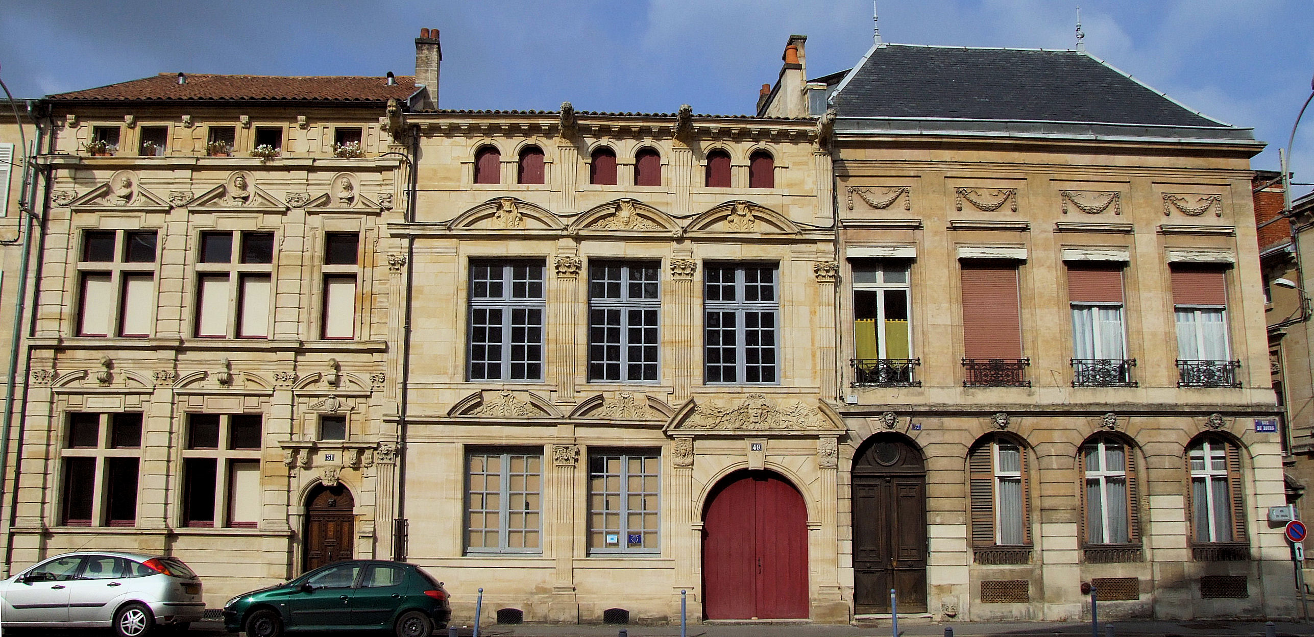 Bar-le-Duc - 47-49-51 rue du Bourg